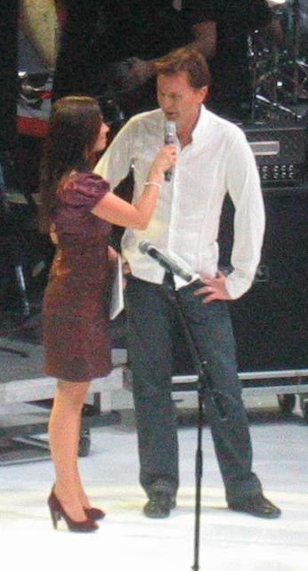 Jore Marjaranta in Hartwall Arena 12.9.07